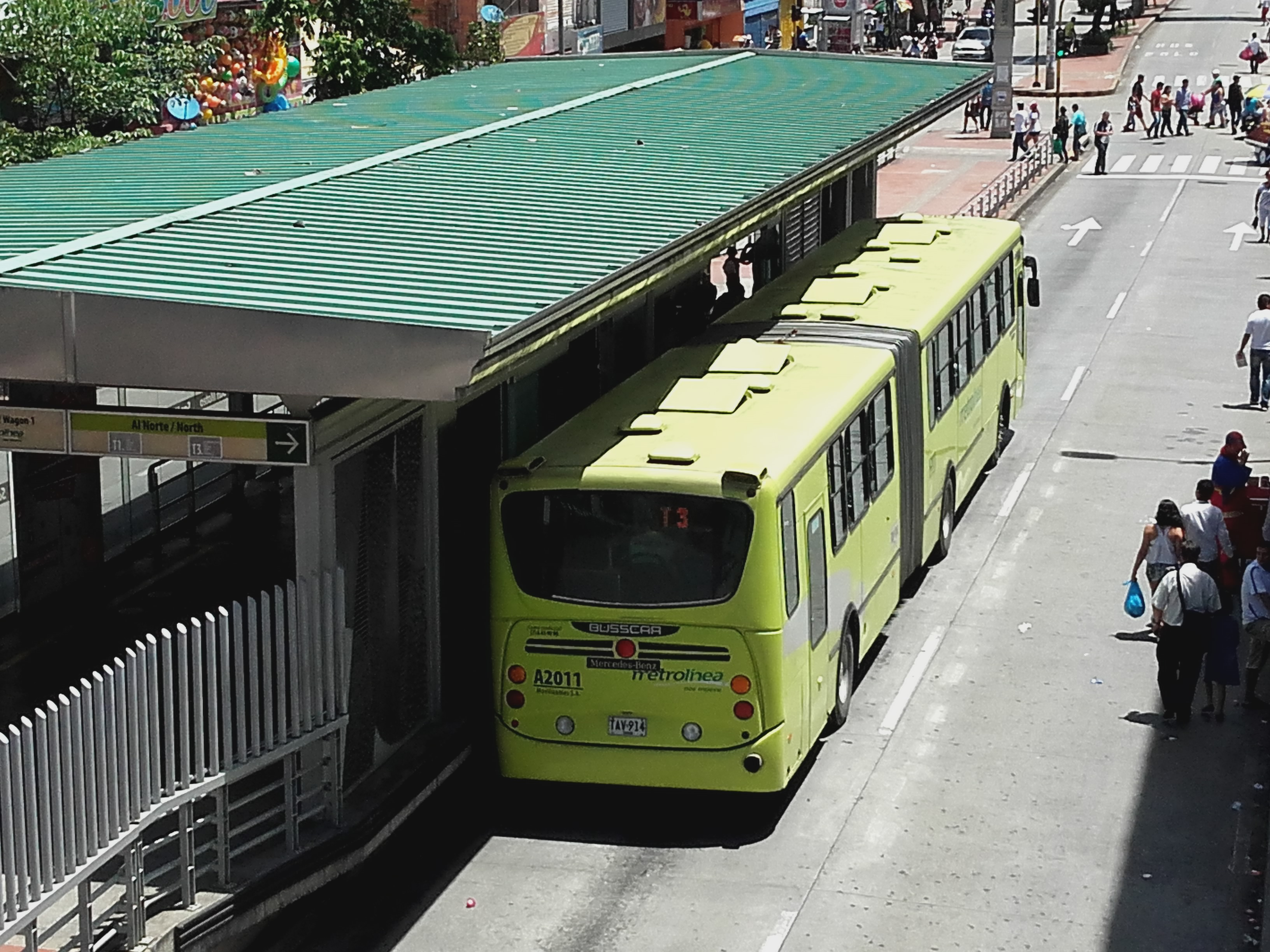 buses